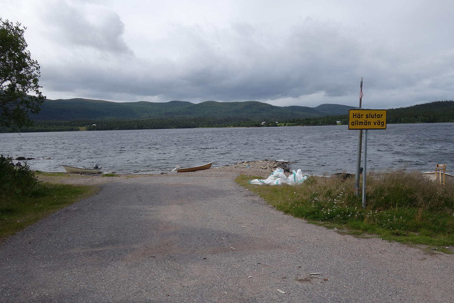 Hamnen vid sjön Laisan i Laisvallby, med Västra Laisvall på andra sidan.